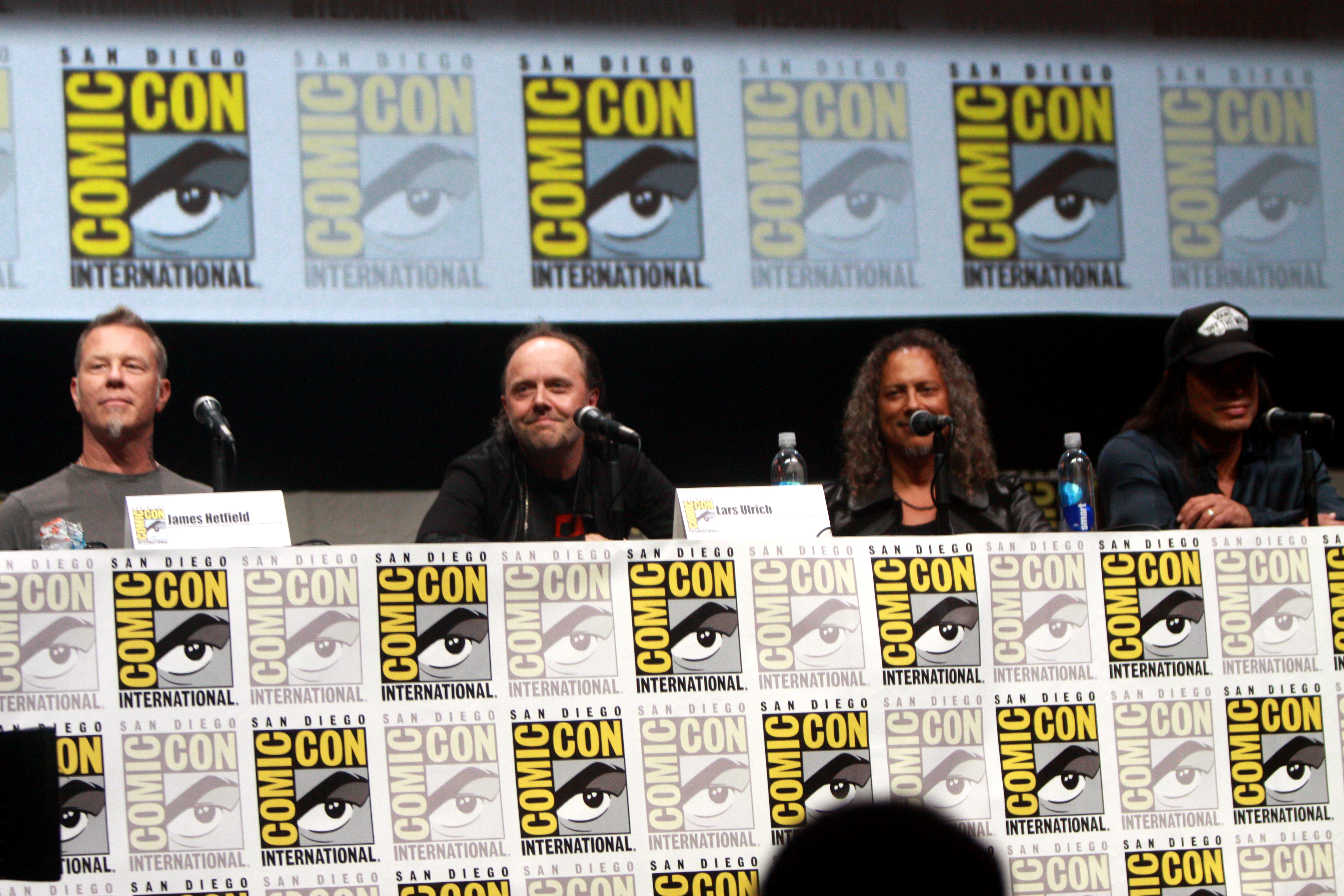 Metallica в 2013 году